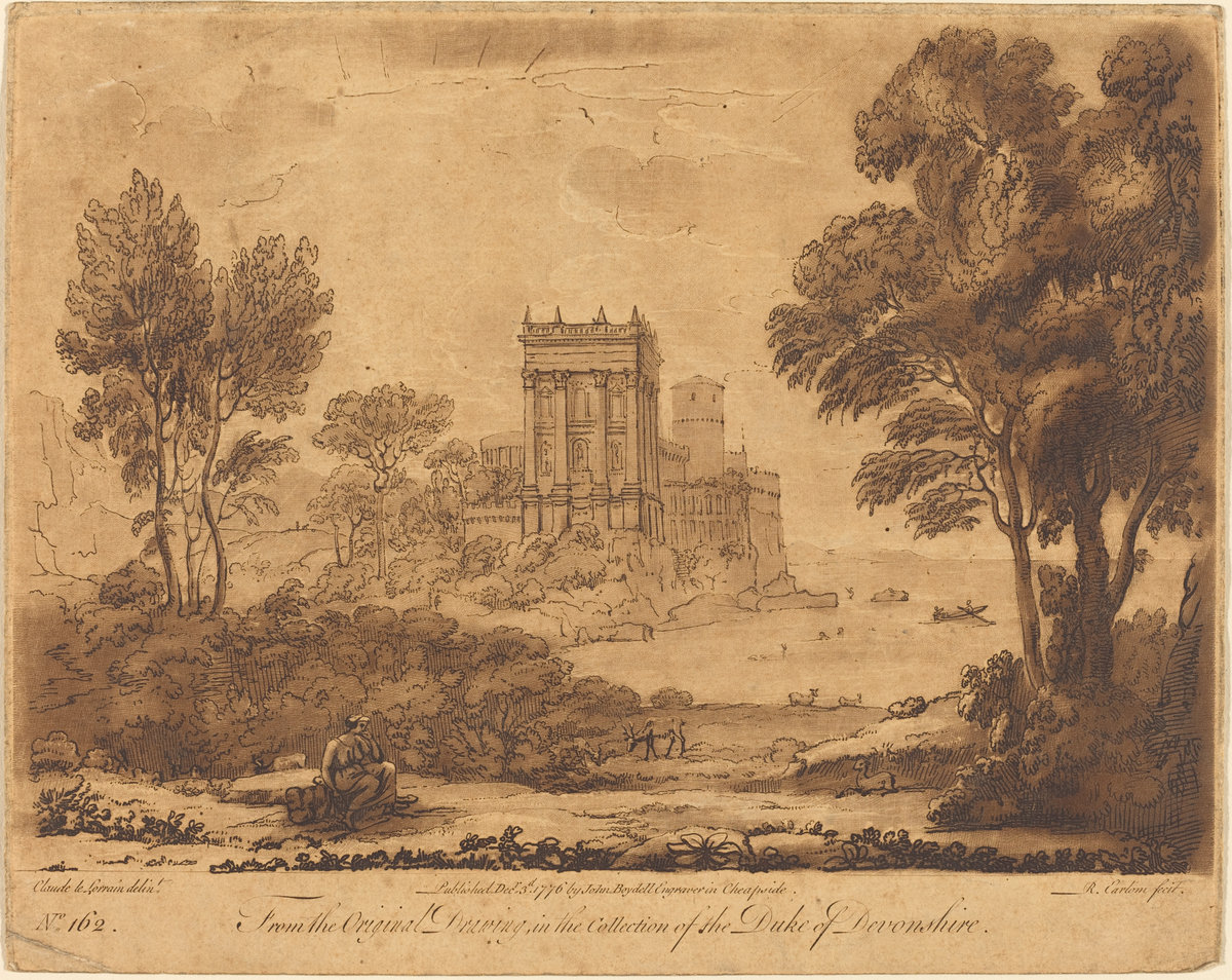 Paisaje con Psique en el exterior del palacio de Cupido, dibujo 162 del Liber Veritatis.